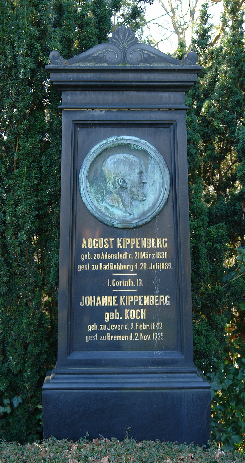 Waller Friedhof in Bremen. Grabstein August und Johanne Kippenberg